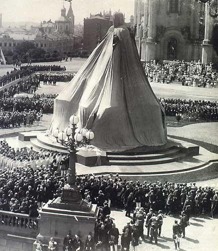 La cérémonie d'inauguration du monument à Alexandre III à Moscou